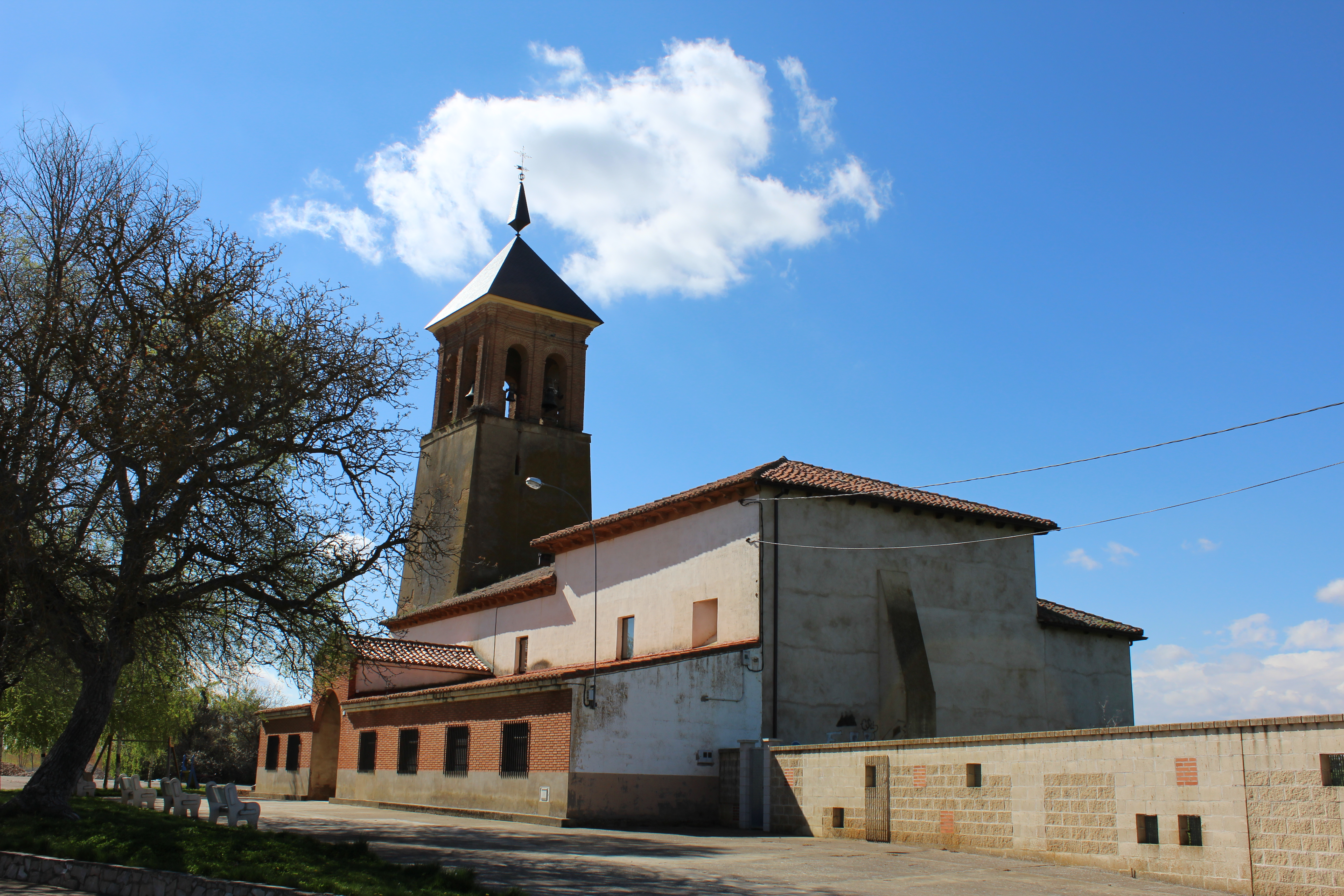 Vista trasera de la iglesia de Cabreros del Río